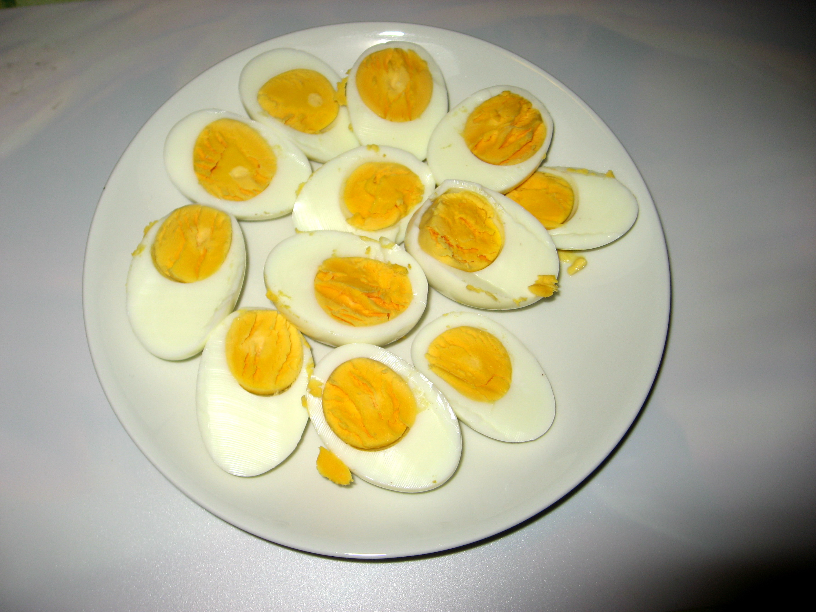 Vajíčka na tvrdo